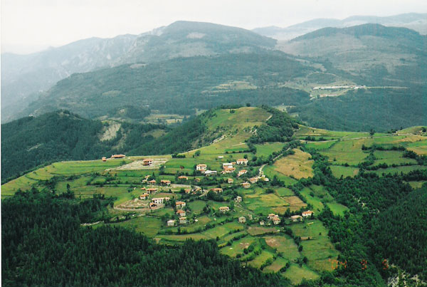 Изглед от Белинташ към с. Врата (Родопите) Собствена фотография Автор Ket View from the "Belintash Rocks" towards the village of Vrata in the Rhodope Mountains, South Bulgaria. Author: User:Ket